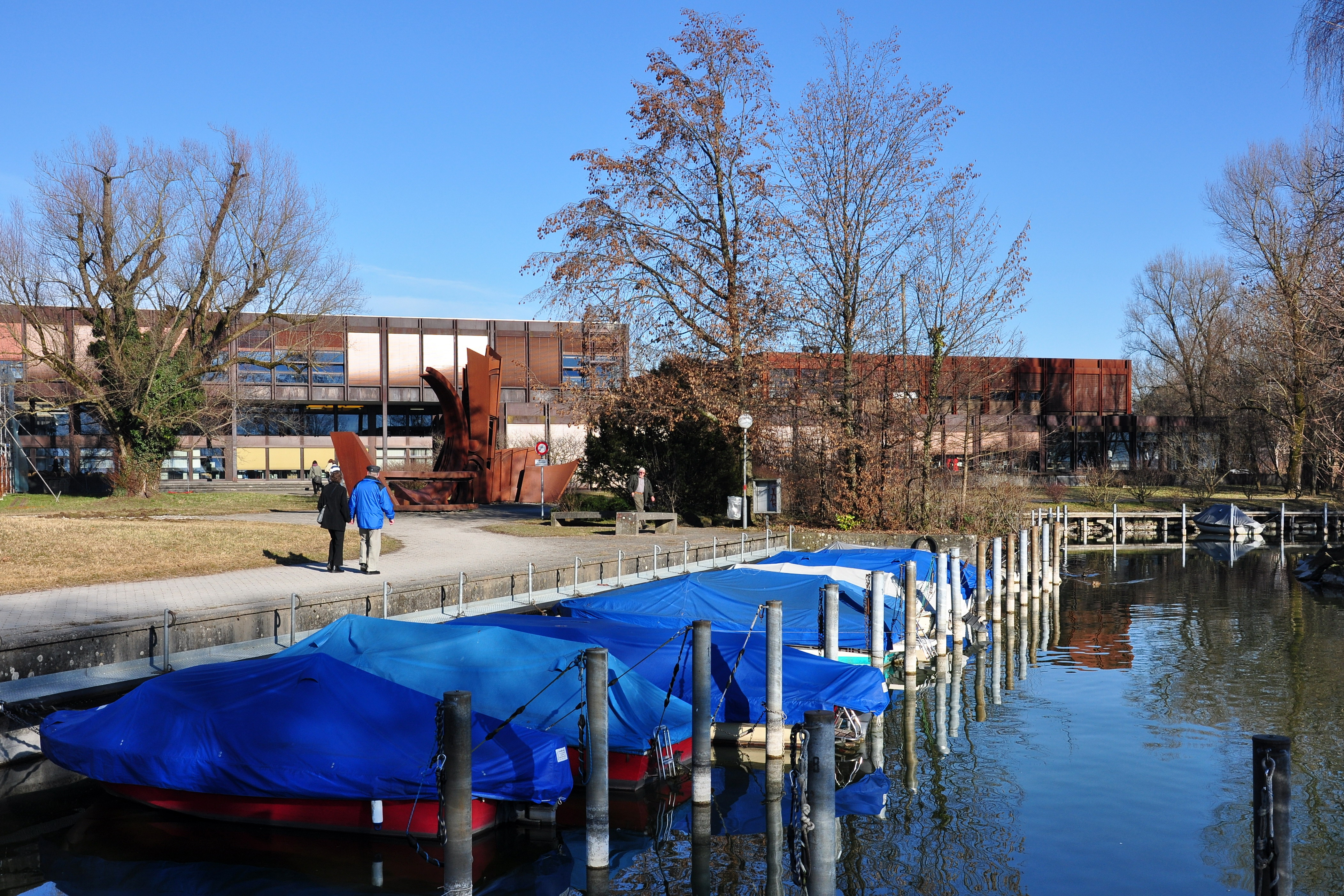 Hochschule für Technik Rapperswil (HSR) in Rapperswil (Switzerland)